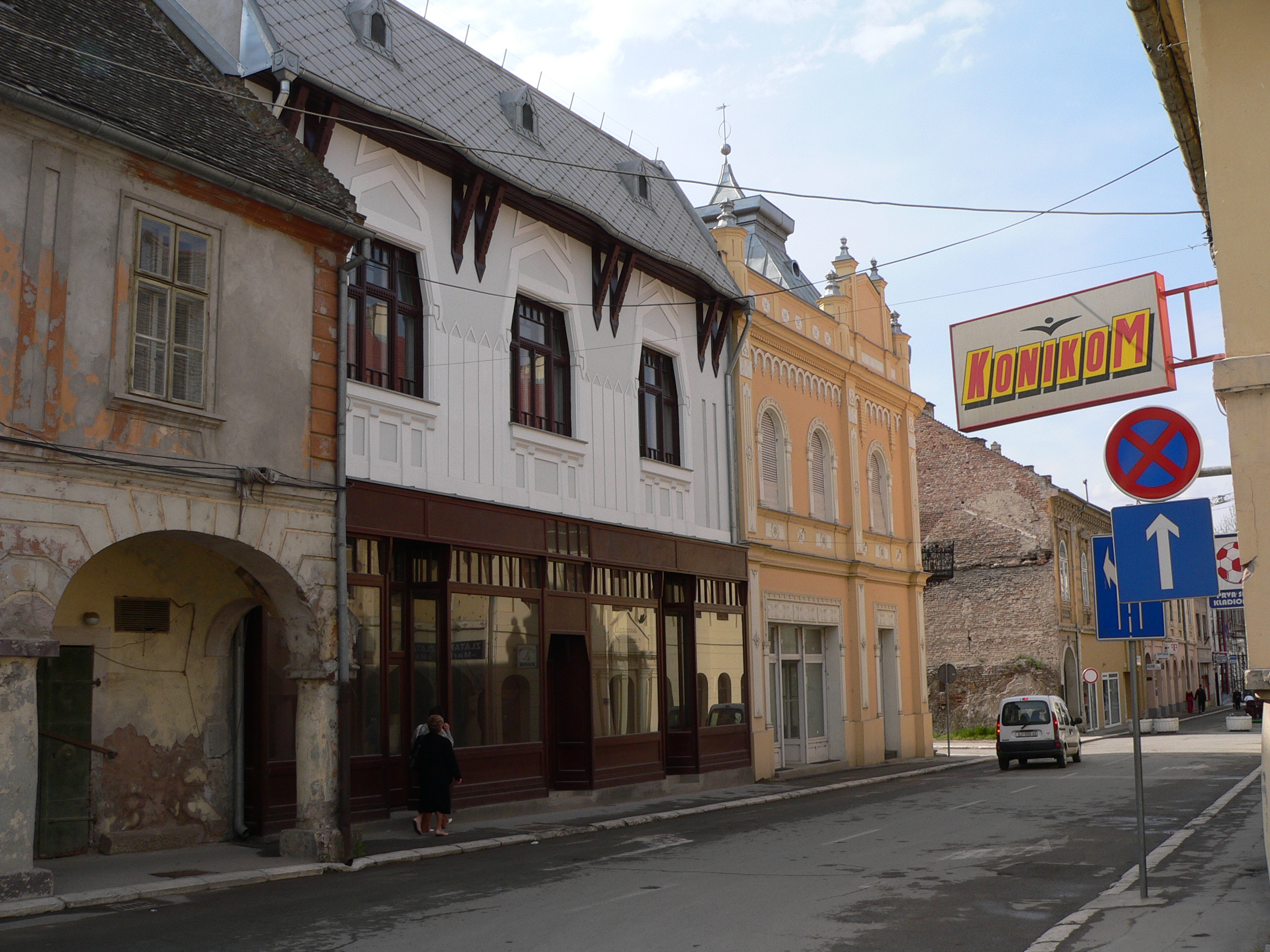 Restored wooden building, Vukovar